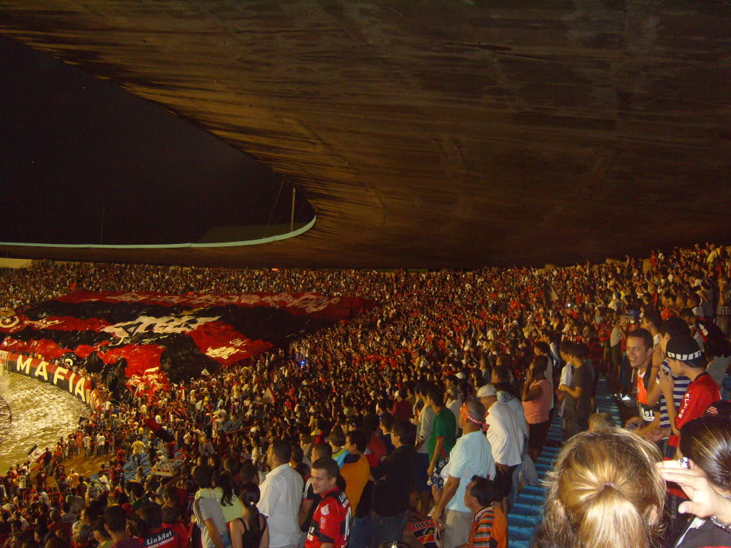 Jogo do Dragão